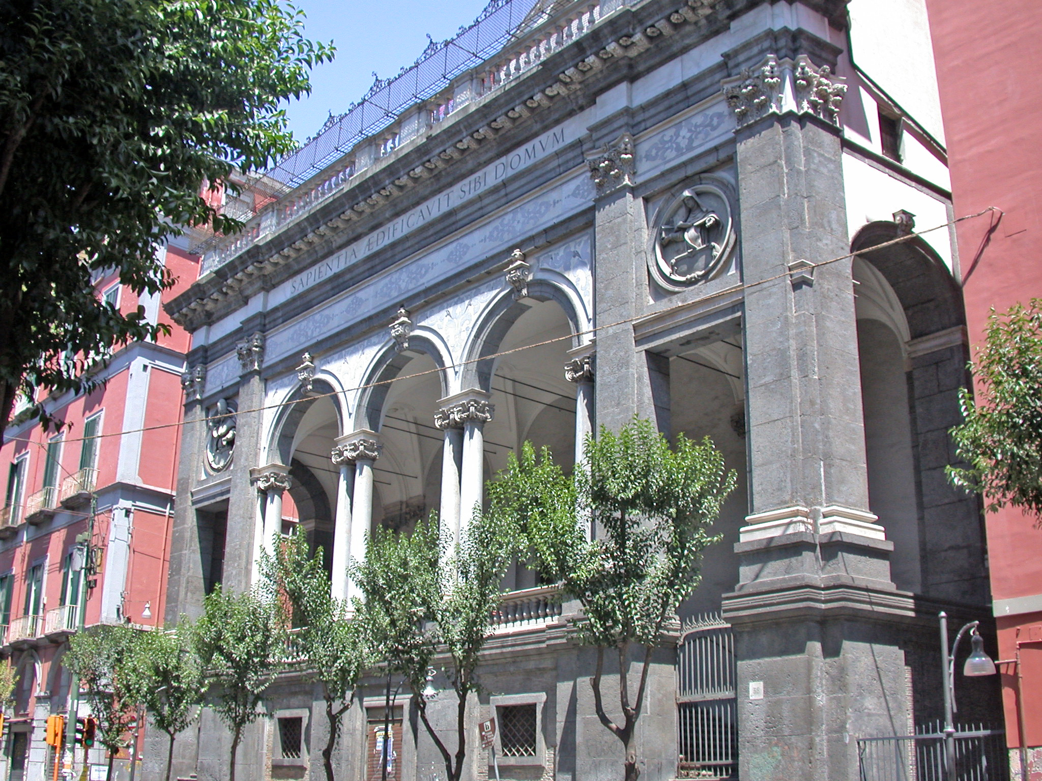 Italia, regione Campania, Napoli, chiesa di Santa Maria della Sapienza, facciata, loggiato di ingresso.